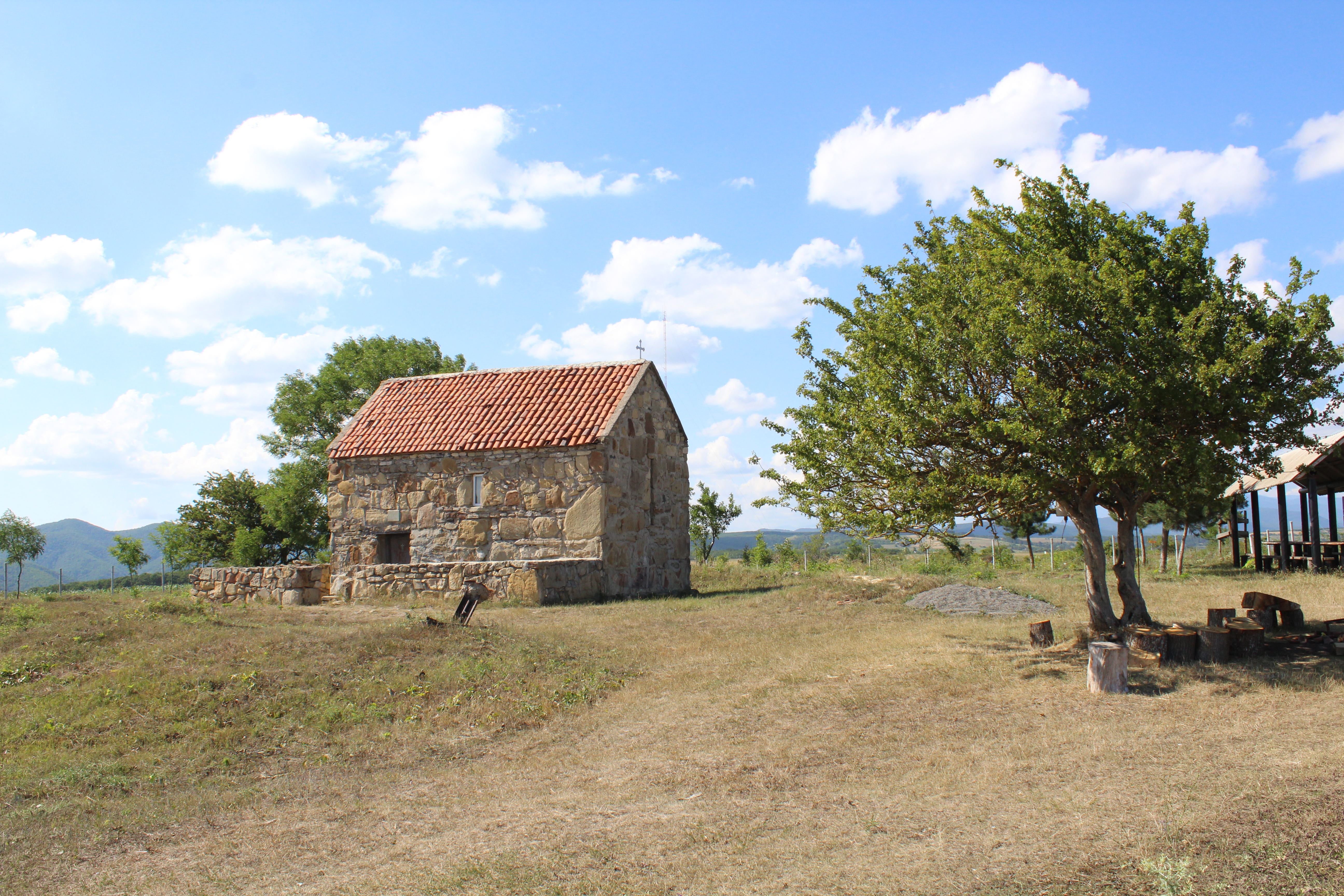 სამყვირალოს წმინდა გიორგის ეკლესია